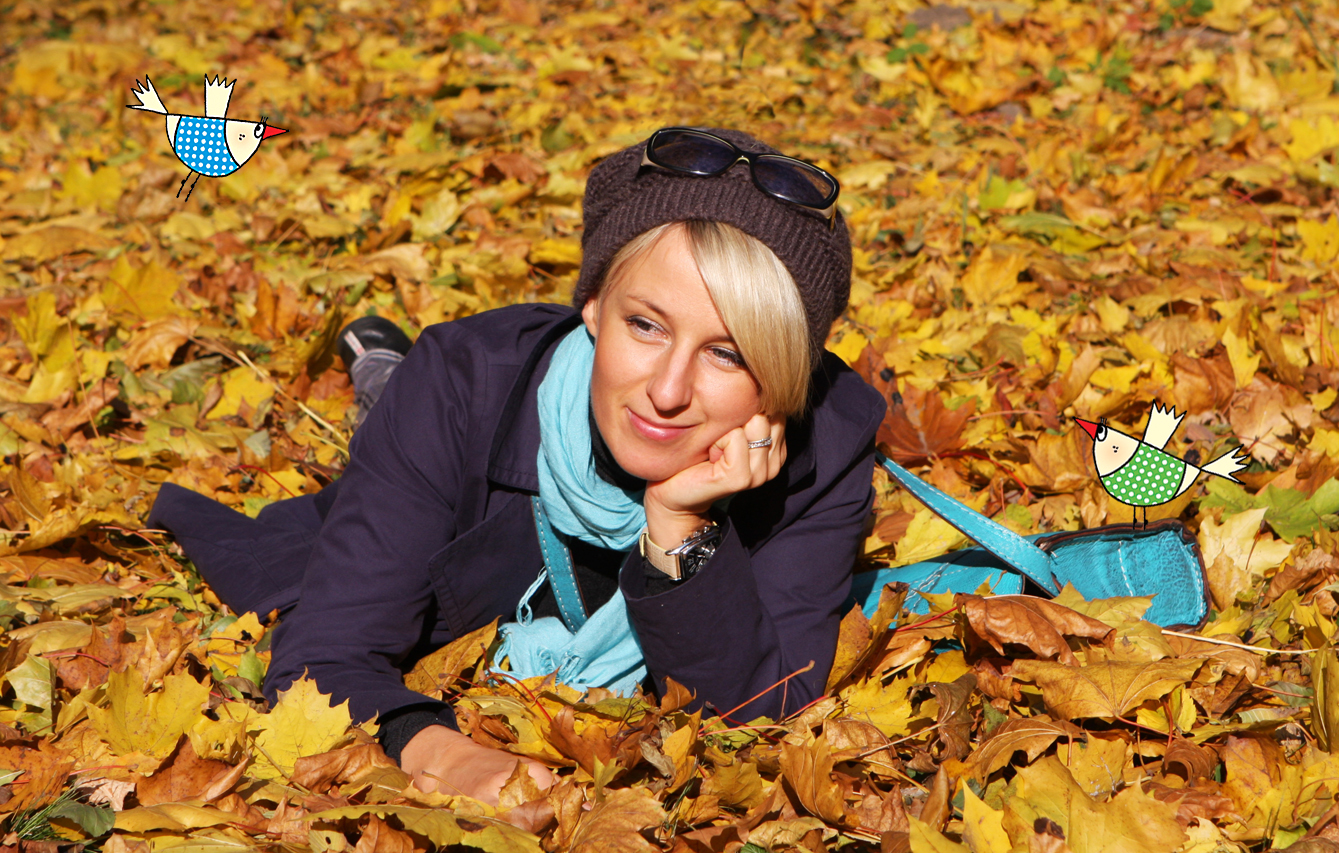 Eliza Piotrowska - Autorka i ilustrator książek dla dzieci i młodzieży